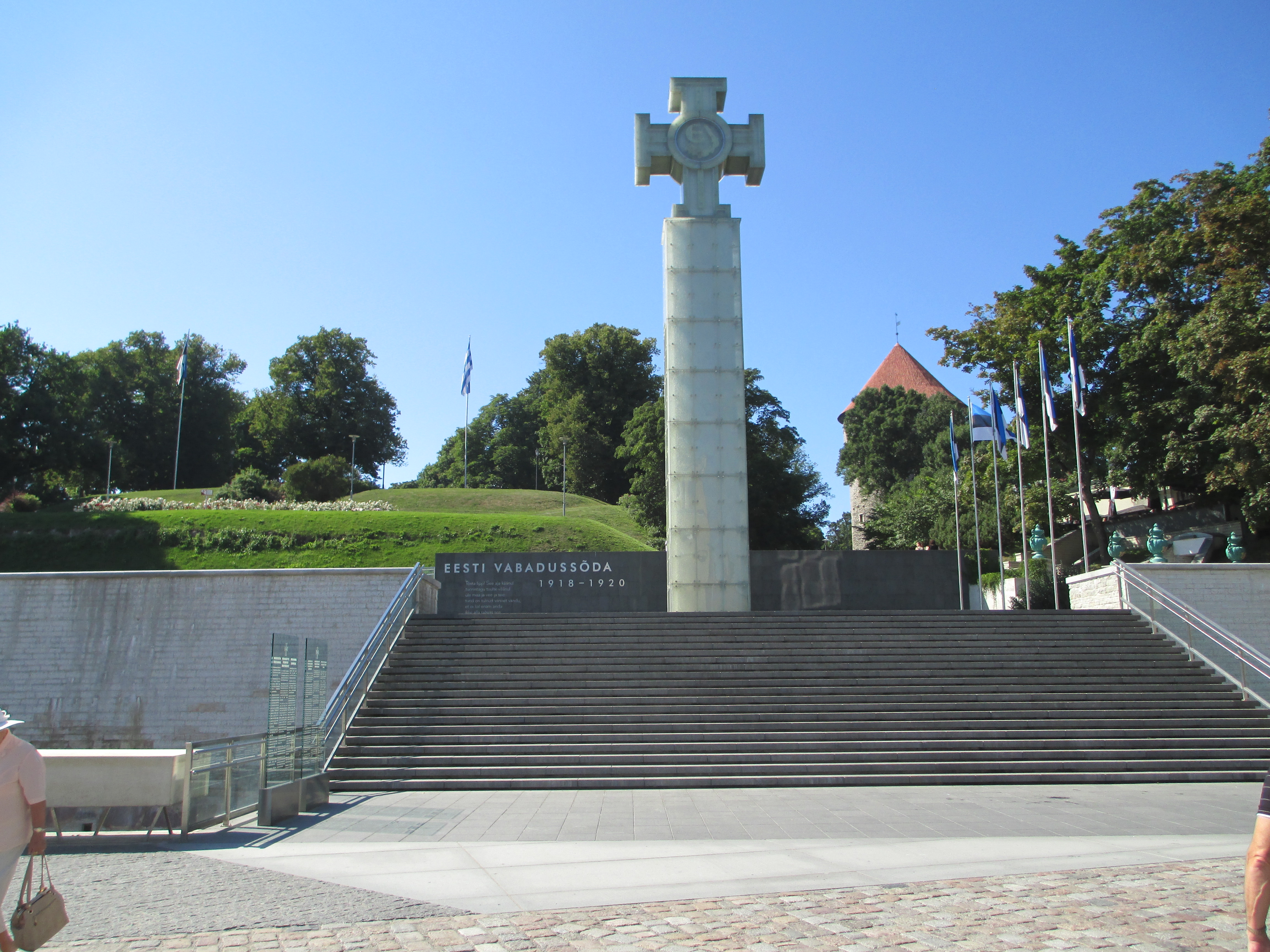 עמוד הניצחון במלחמת העצמאות של אסטוניה (1918 - 1920) בטאלין